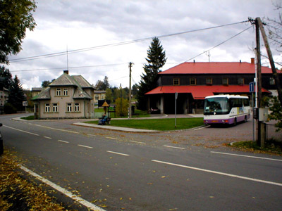 Pěčín - křižovatka